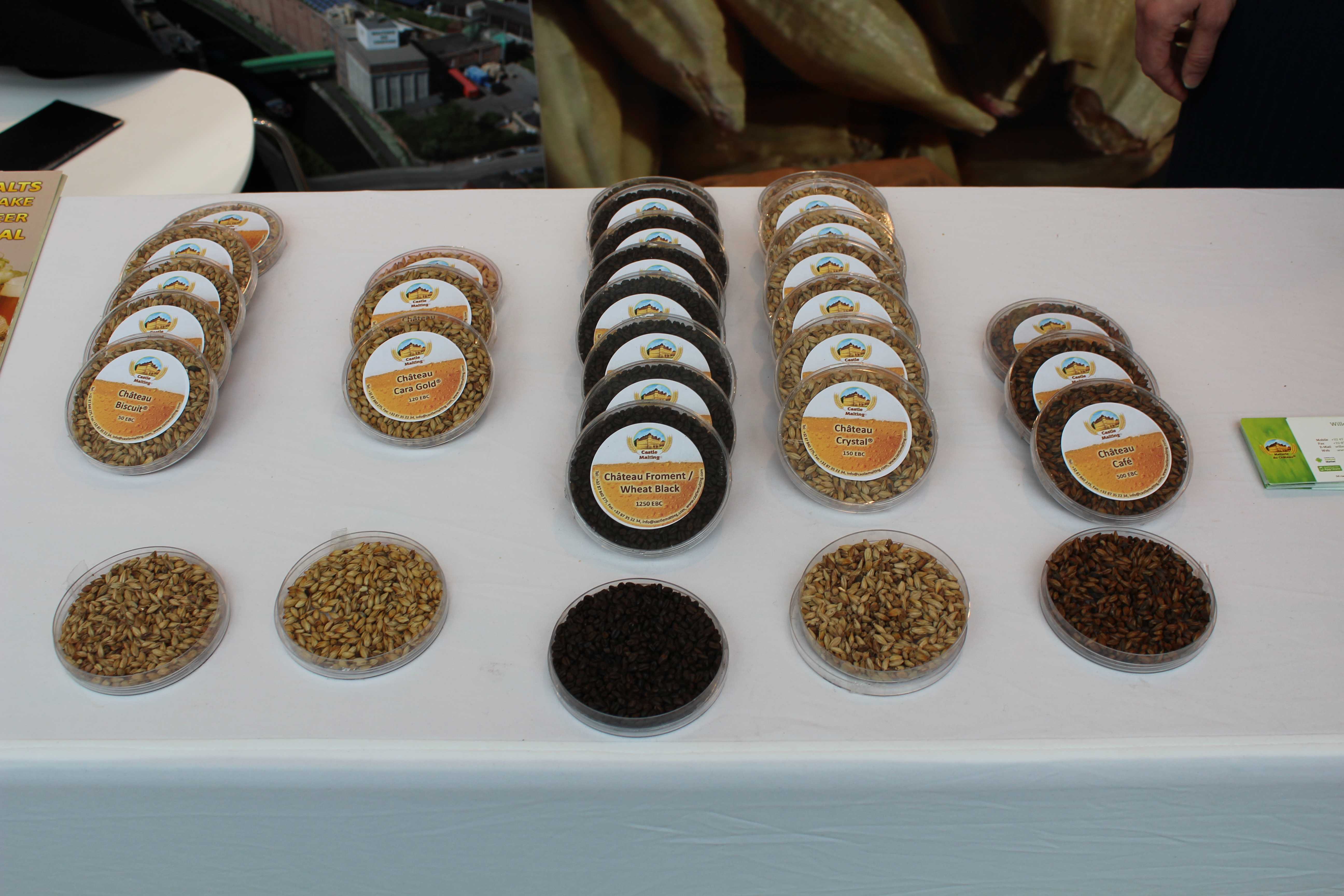 Braukunst live 2016, Probepäckchen mit verschiedenen Malzsorten der belgischen Mälzerei Caste Malting.